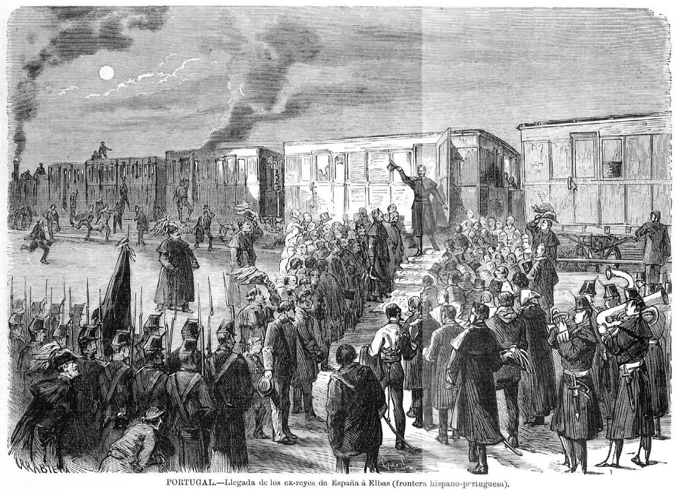 Portugal, llegada de los ex-reyes de España a Elbas (frontera hispano-portuguesa), en la revista española La Ilustración Española y Americana.